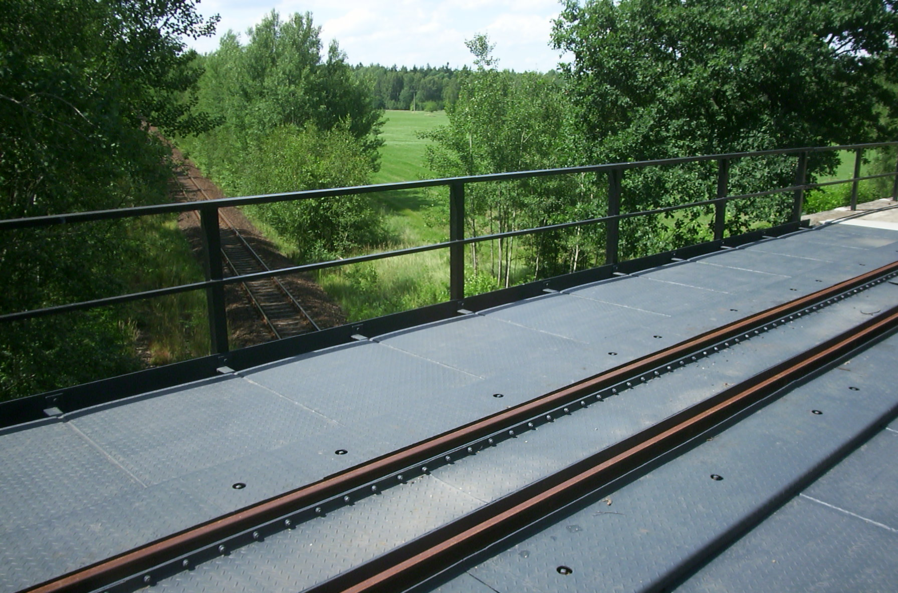 Eisenbahnbrücke der Waldeisenbahn Muskau (de.WP, 600 mm) in Weißwasser (Strecke Tiergarten/Tongrube Mühlrose – Bahnhof der Waldeisenbahn) über der Berlin-Görlitzer Eisenbahnstrecke (de.WP, Streckenabschnitt Schleife – Weißwasser) Map: 51° 30' 48" N, 14° 36' 12" E